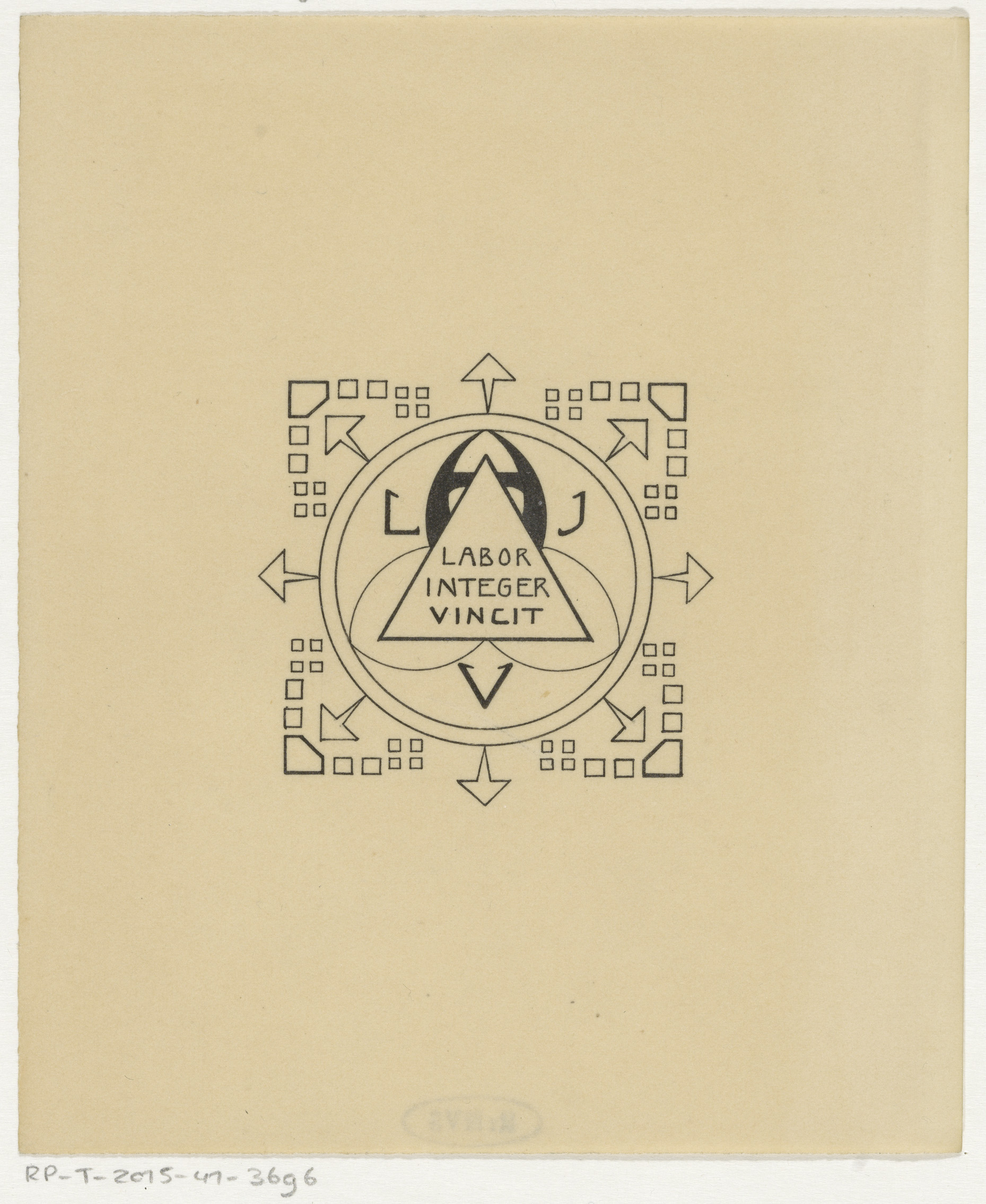 IdentificatieTitel(s): Vignet van Uitgeversmaatschappij L.J. VeenObjecttype: tekening boekillustratie (ontwerp) Objectnummer: RP-T-2015-41-3696Opschriften / Merken: verzamelaarsmerk, verso, gestempeld: Lugt 2228aOmschrijving: Motto 'Labor Integer Vincit' in een driehoek omgeven door drie bladachtige motieven en de letters L, J en V. Geheel omsloten door een decoratieve cirkel met pijlen en hoekige vormen.VervaardigingVervaardiger: tekenaar: anoniemDatering: in of na 1887 - ca. 1940Fysieke kenmerken: pen in zwartMateriaal: papier inkt Techniek: penAfmetingen: h 152 mm × b 126 mmOnderwerpWat: ornaments ~ artVerwerving en rechtenCredit line: Schenking van Uitgeverij L.J. VeenVerwerving: schenking 1970Copyright: Publiek domein